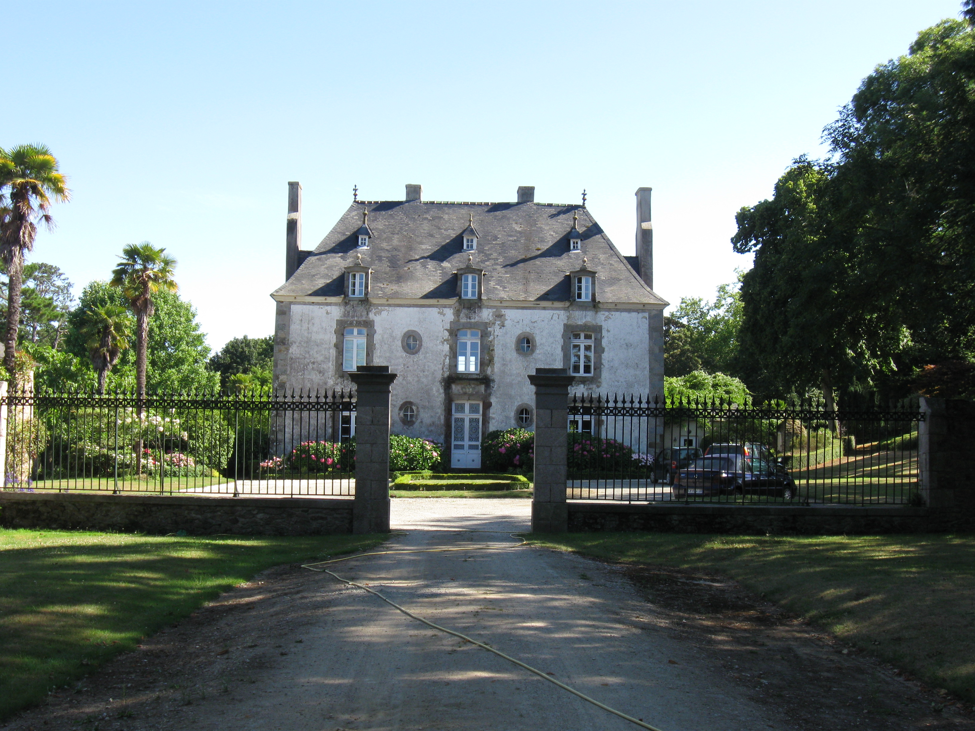 Le château de la Ravillais, commune de Ploubalay. (Côtes-d'Armor, région Bretagne).